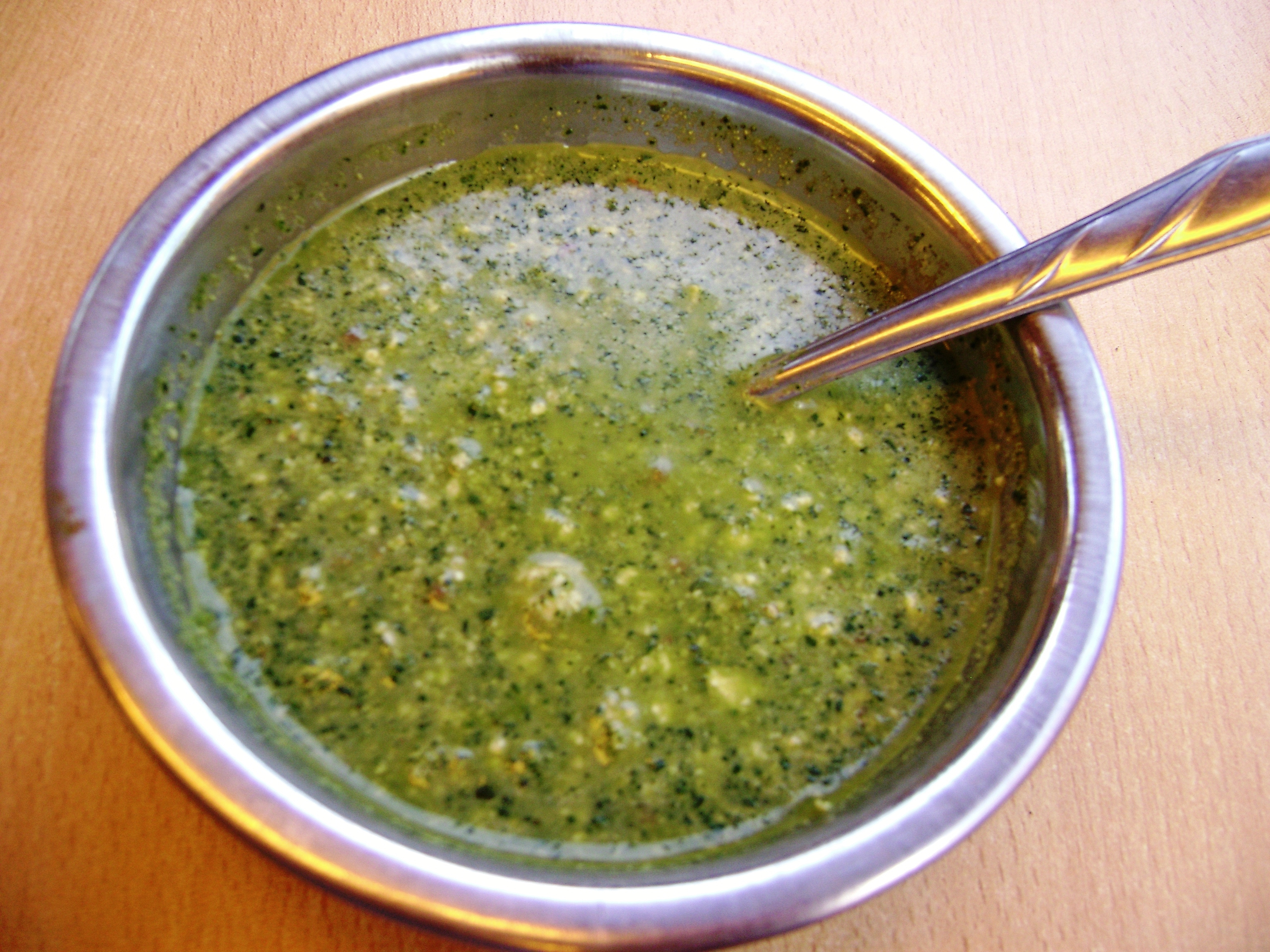 Crema de ají. Junín, Perú.